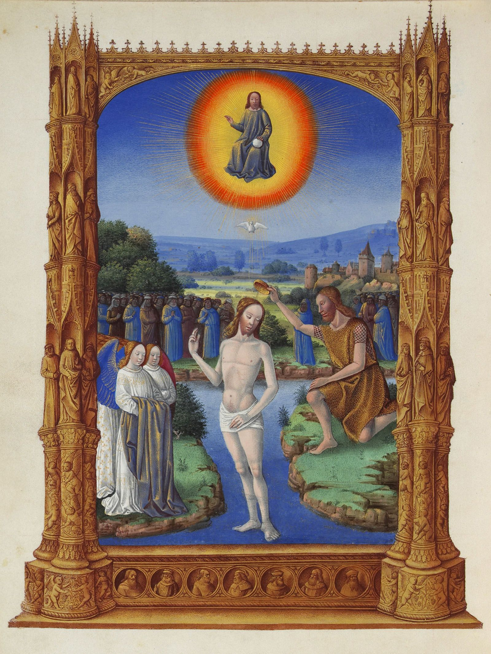 Le Christ baptisé par saint Jean dans le Jourdain, surmonté de la Trinité. Deux anges tiennent ses vêtements à gauche et une foule est rassemblée à l'arrière, au centre d'un paysage